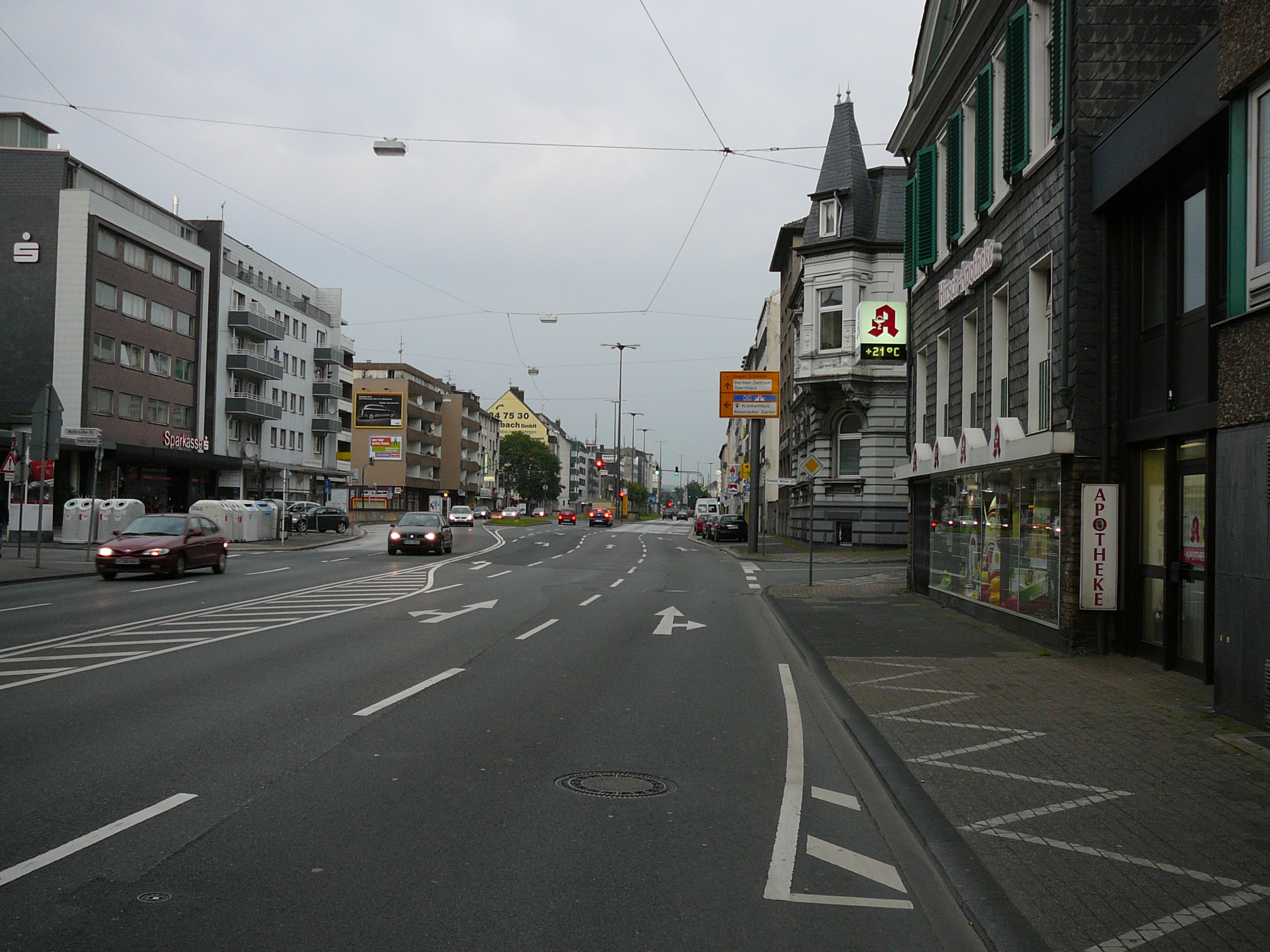 Friedrich-Engels-Allee, Wuppertal